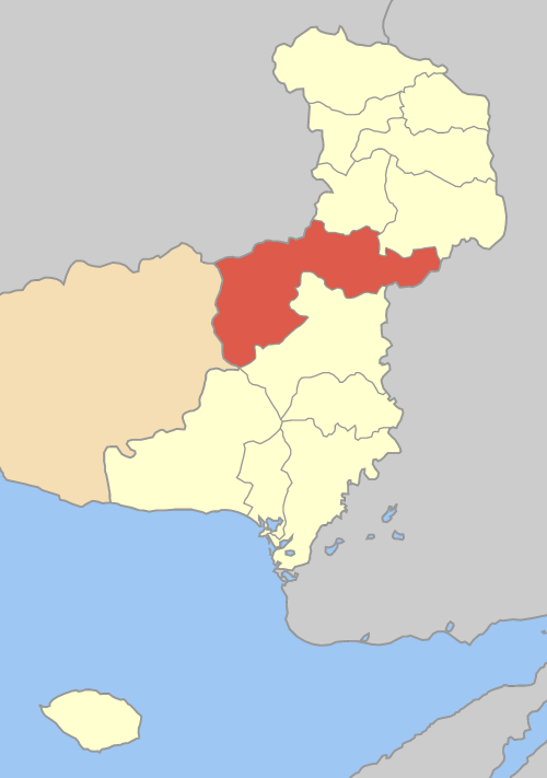 Дем Орфей на картата на Ном Еврос, Гърция Locator map of Orfea municipality (Δήμος Ορφέα) in Evros prefecture (Νομός Έβρου) in Greece.